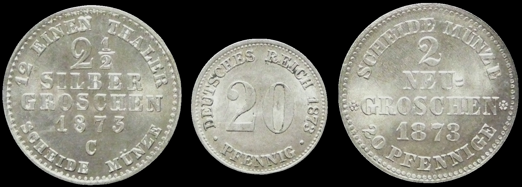 2½ Silbergroschen 1873 zu 3,221 g mit 1,208 g Feinsilber und 20 Pfennig 1873 zu 1,111 g mit 1,0 g Feinsilber und 2 Neugroschen 1873 zu 3,221 g mit 0,967 g Feinsilber Nach Einführung der Reichswährung bleiben gemäß Artikel 15 Nr. 3 Münzgesetz vom 09. Juli 1873 die Nominale - 2½ Silbergroschen zum Wert von 25 Pfennig - 2 Silbergroschen zum Wert von 20 Pfennig - 1 Silbergroschen zum Wert von 10 Pfennig - ½ Silbergroschen zum Wert von 5 Pfennig Zahlungsmittel an Stelle der Reichsmünzen bis zur Außerkurssetzung ab 01. Juni 1876 zum gleichen Wert. Der Umtausch musste bis 31. August 1876 an den Kassen der Bundesstaaten erfolgen, die diese Münzen geprägt haben oder in deren Gebiet dieselben Zahlungsmittel sind.